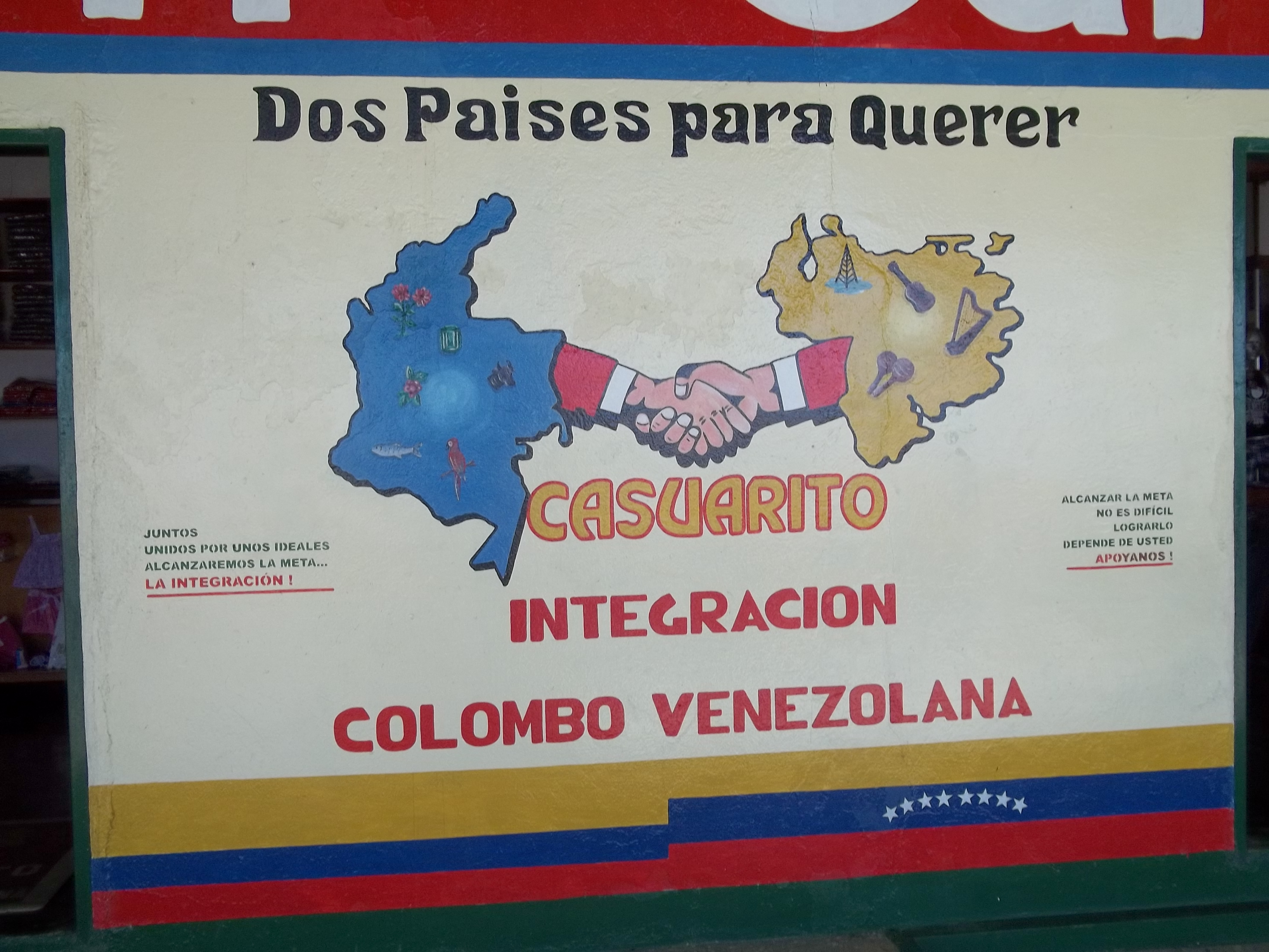 mural de fortalecimiento de cultura de dos paises